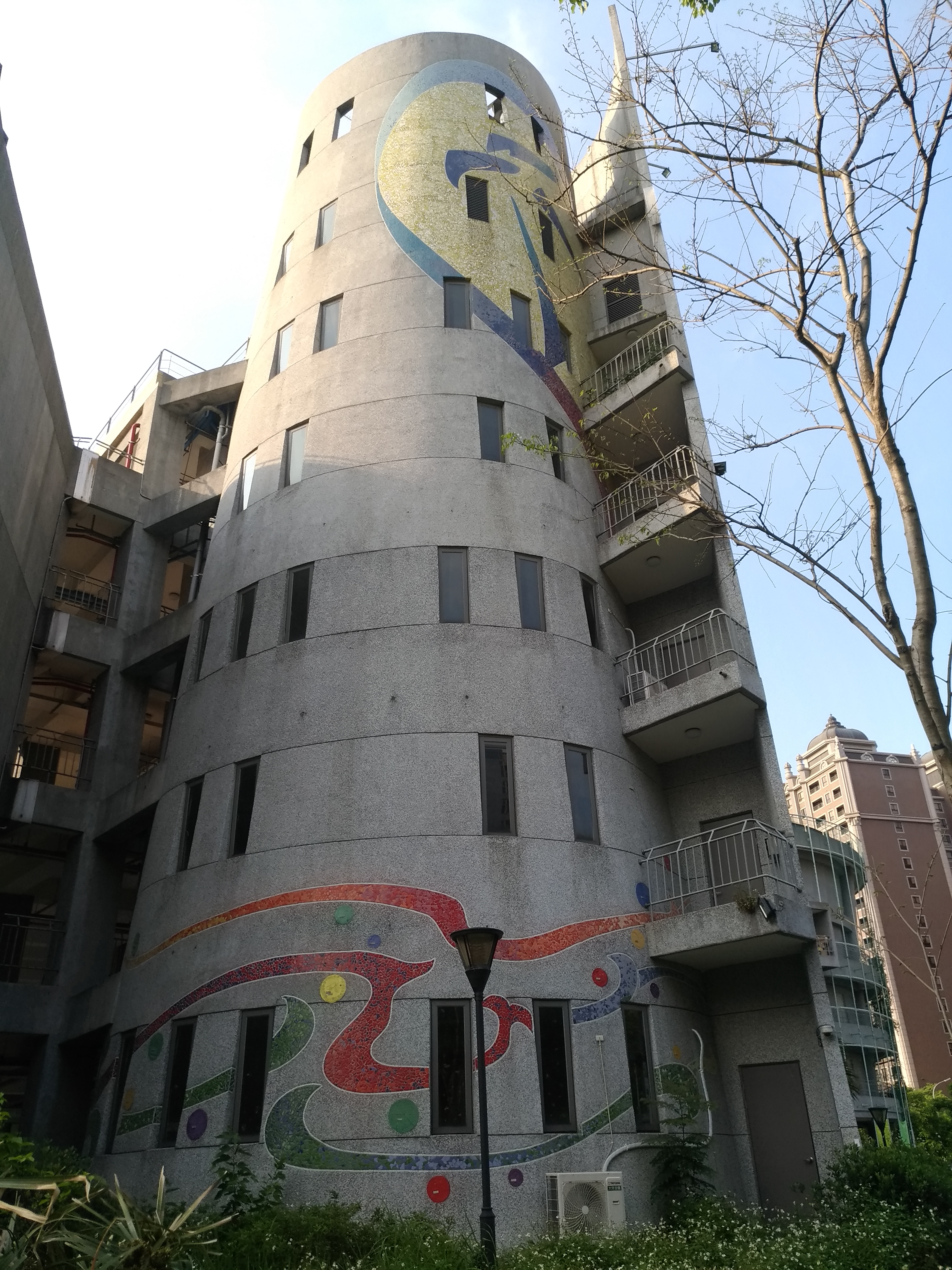 從海洋公園仰視鳶塔，能發現它有紙捲的造型。